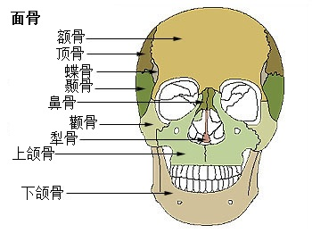 头骨骨头